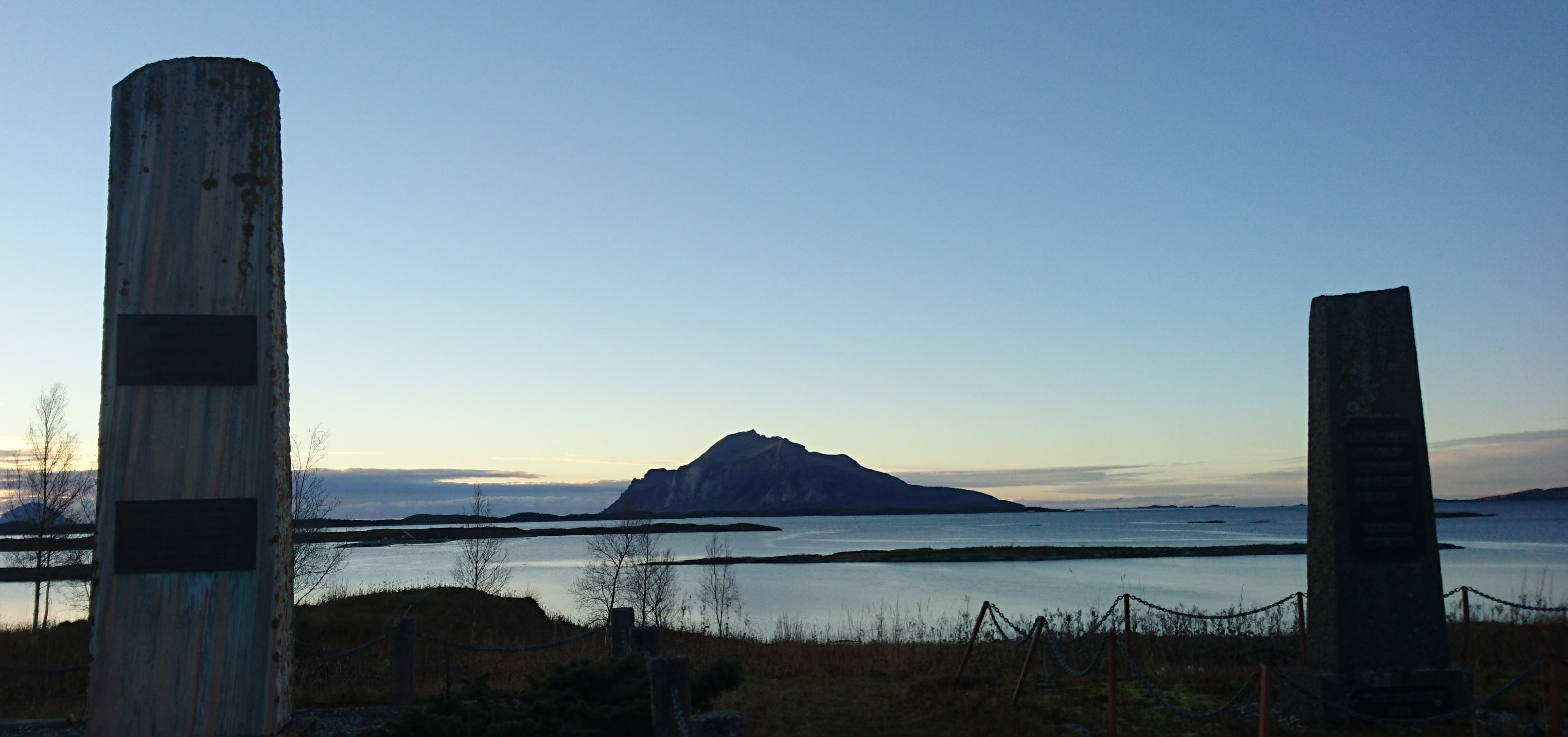 Minnesmerker ved Gildeskål Kirkested